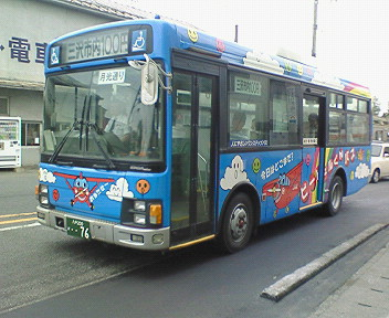 十和田観光電鉄バス ビードルくんバス（いすゞ・エルガミオ：KK-LR233J1） 三沢駅付近にて